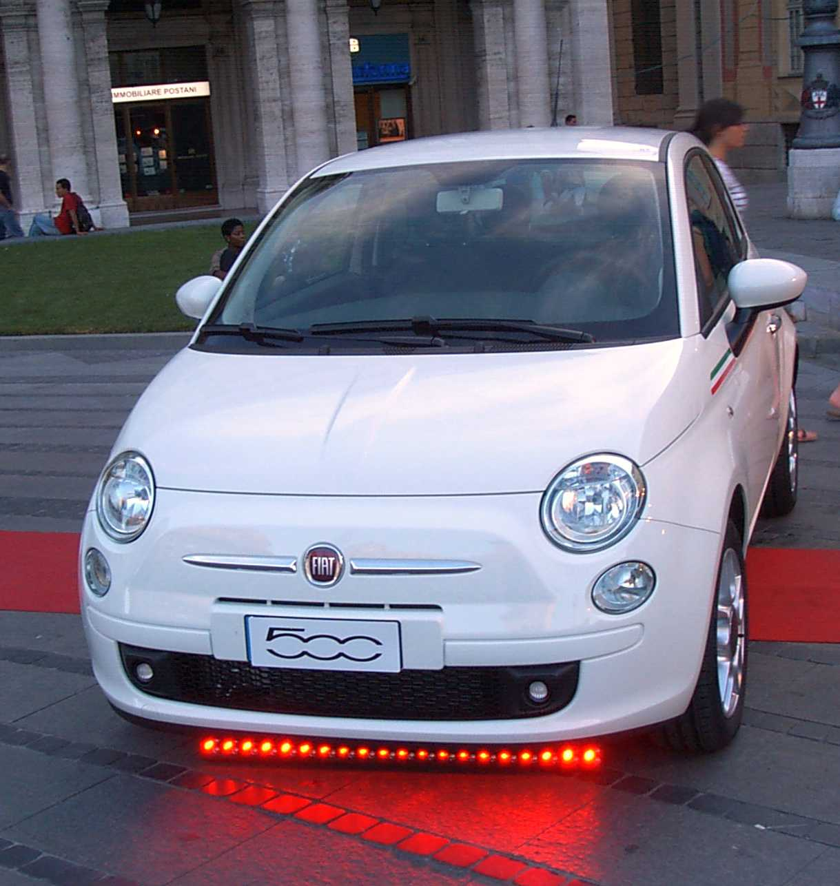 la nuova 500 Fiat viene presentata a Genova/vista anteriore